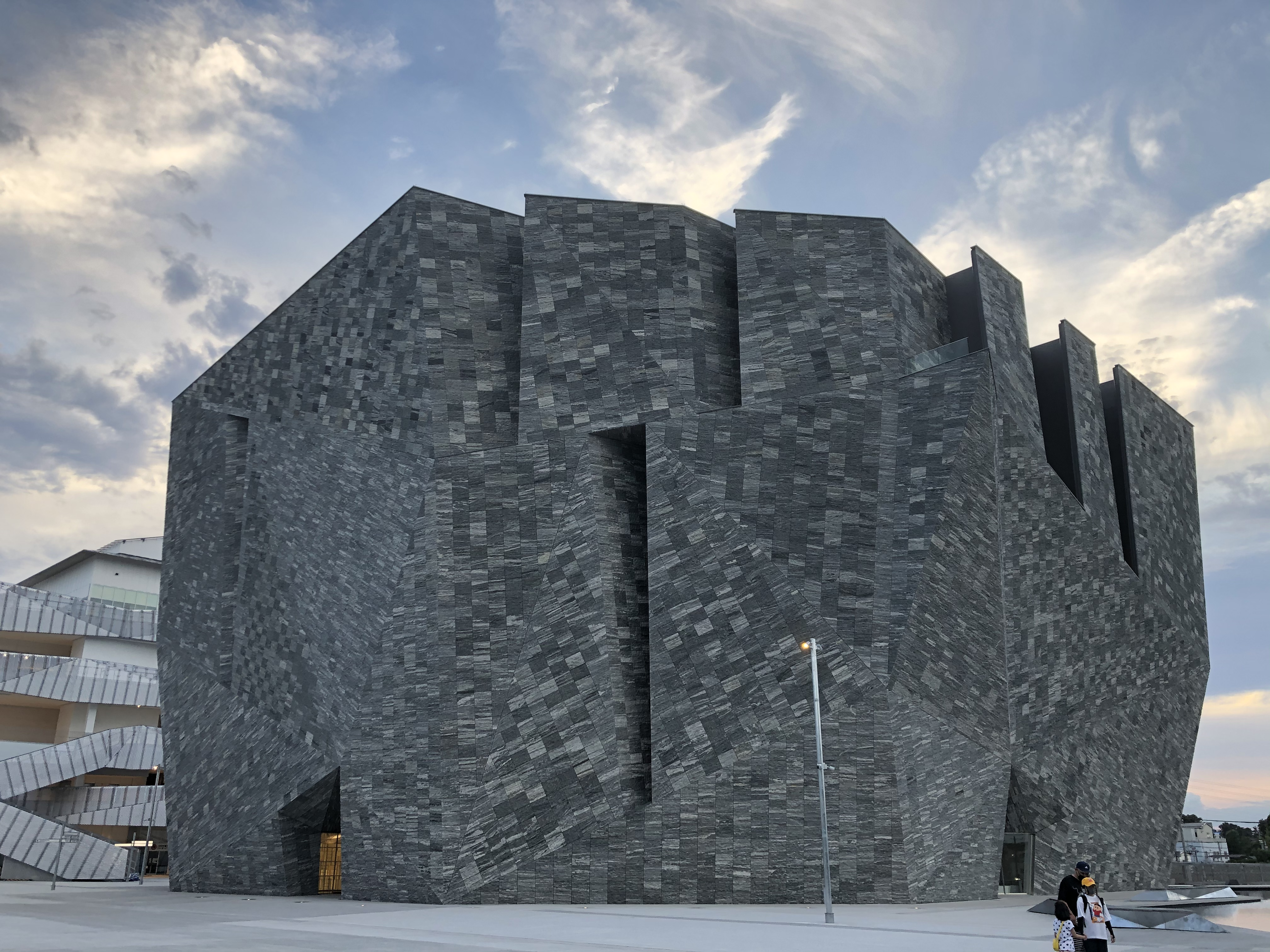 角川武蔵野ミュージアムは、隈研吾設計の角川文化振興財団の施設。